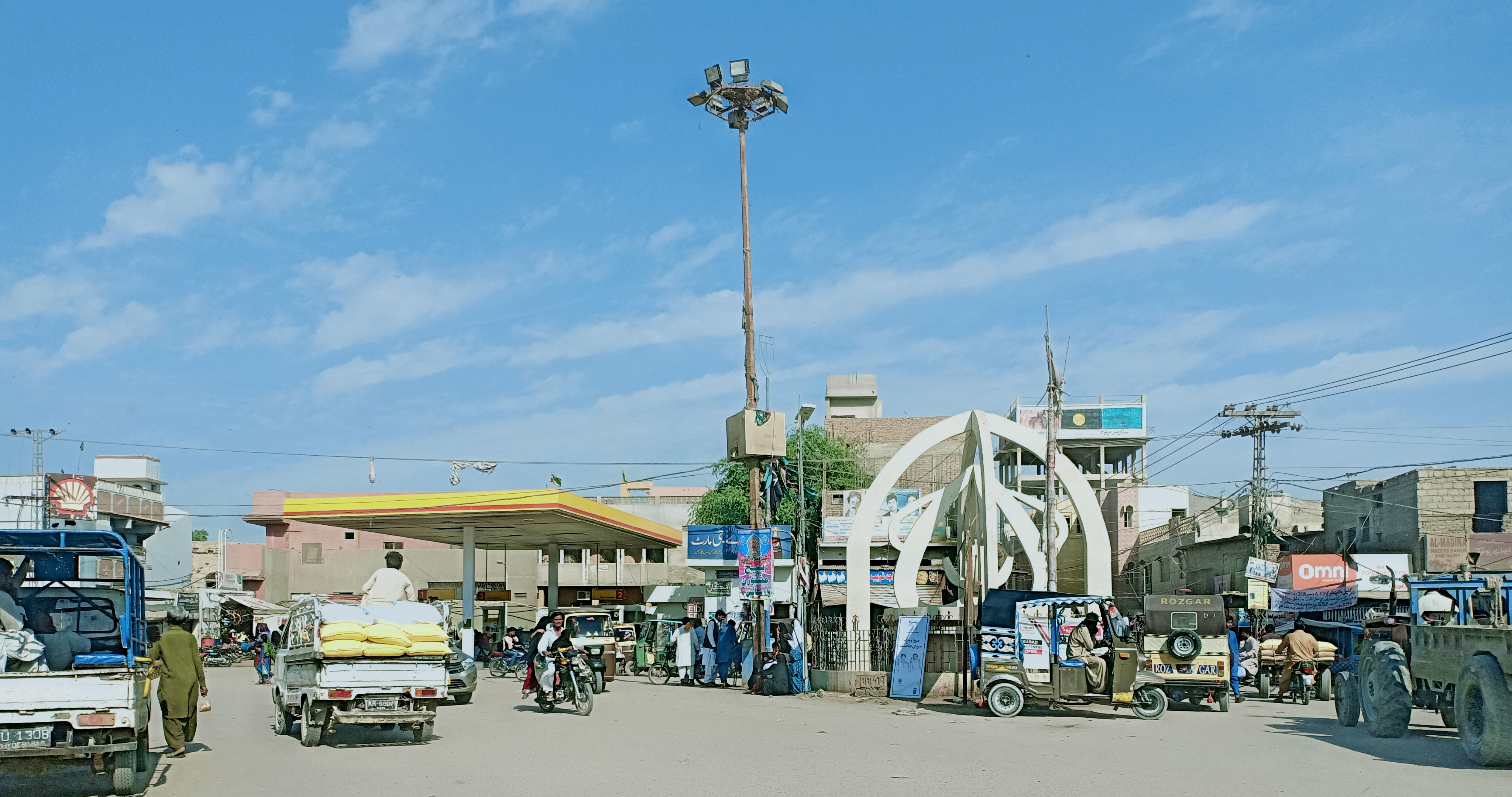 سنڌي: Kotri, Pakistan